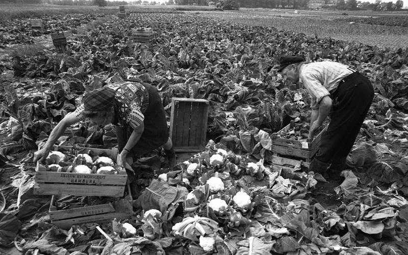 Hamburg Gemüseanbau in den Marschlanden